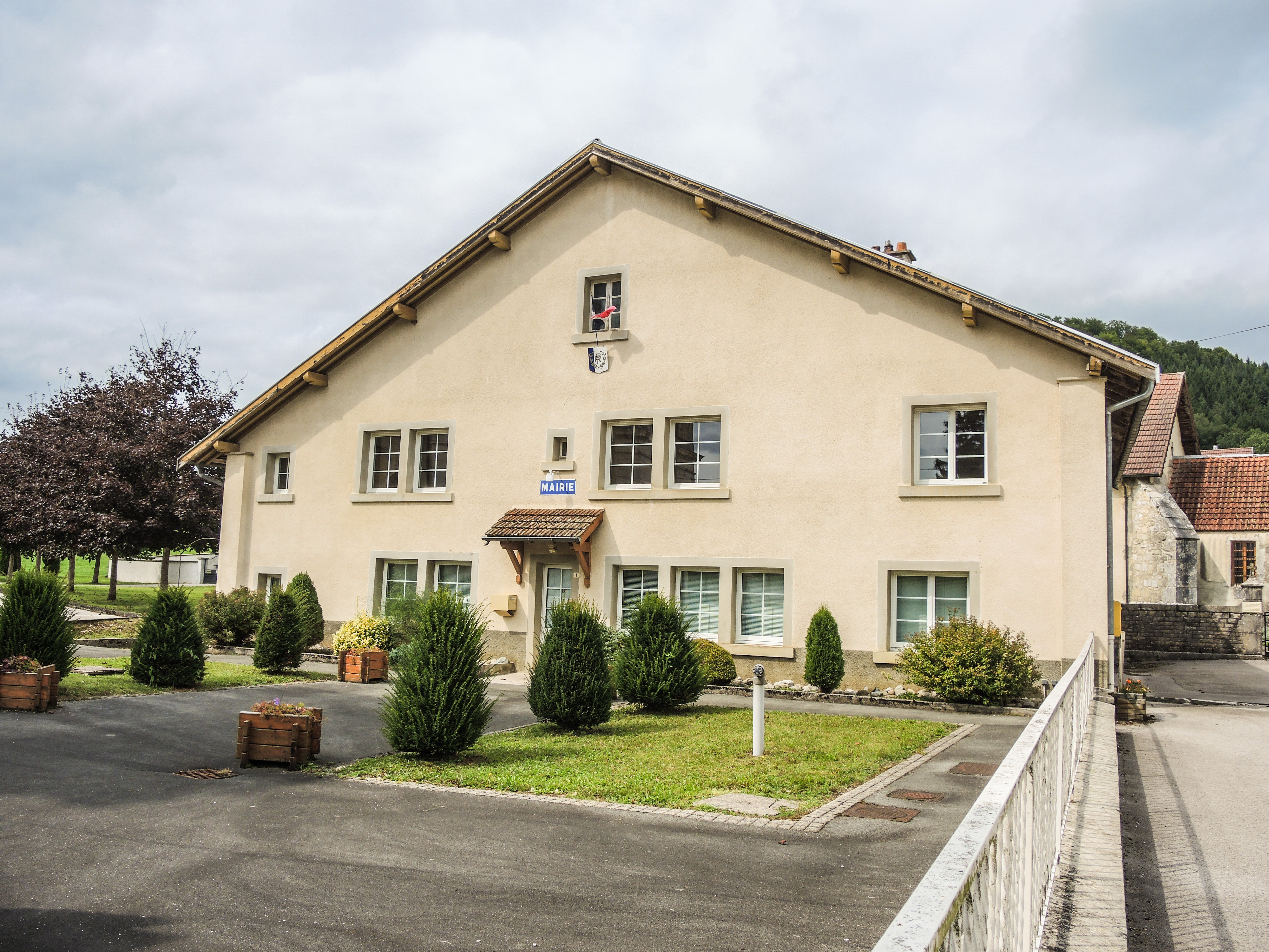 Mairie de Cour-Saint-Maurice. Doubs